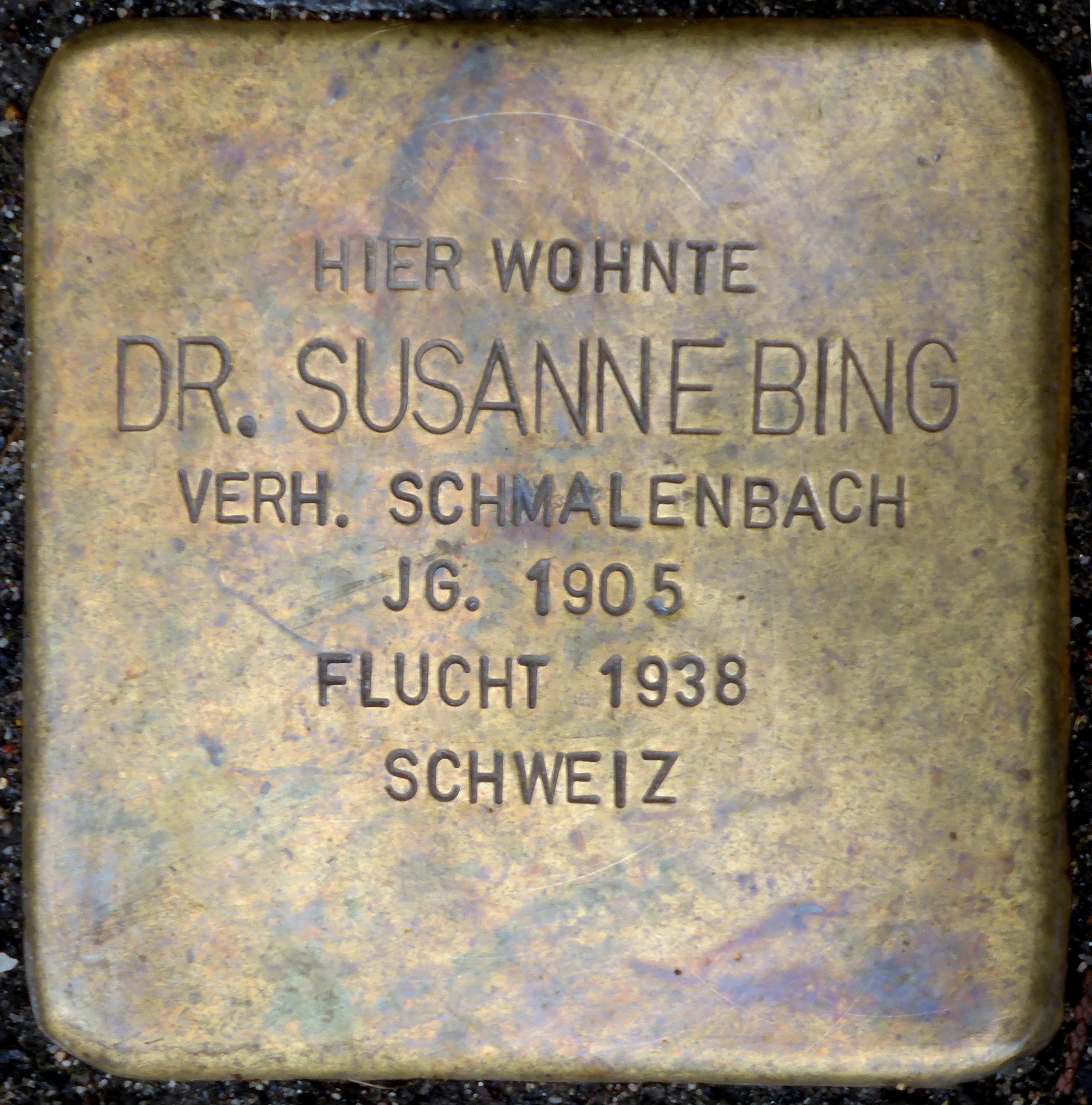 Stolperstein: Dr. Susanne Bing (Oberländer Ufer 208), Köln.